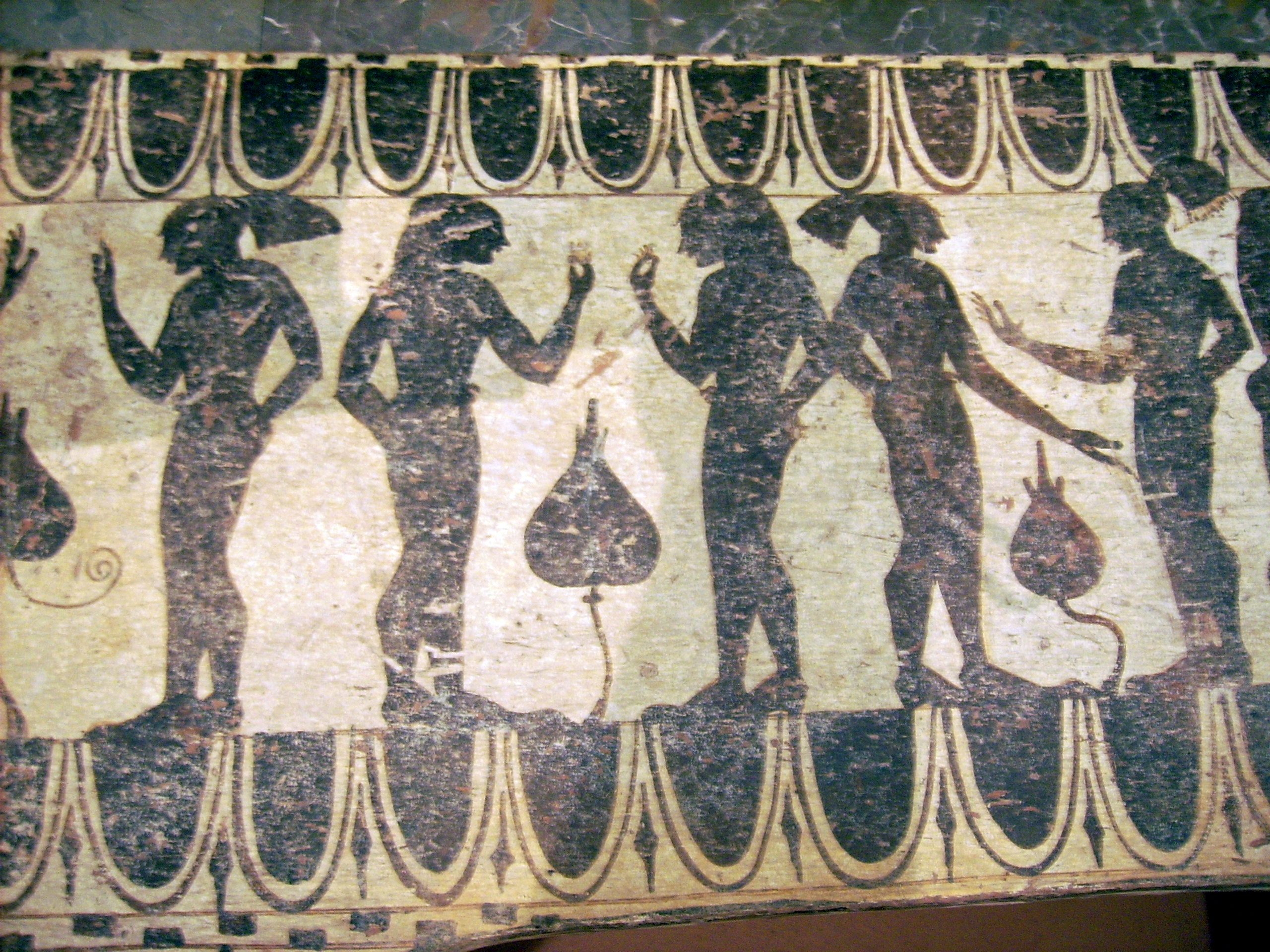 Deteil des Kopfteils eines Klazomenischen Sarkophages aus Klazomenai mit homoerotischer Szene adeliger Jünglinge; Länge 195 cm, Breite 74/62 cm, Tiefe 33,5 cm; bemalt im schwarzfigurigen Stil; Inv.-Nr.: 30030, Antikensammlung Berlin/Altes Museum